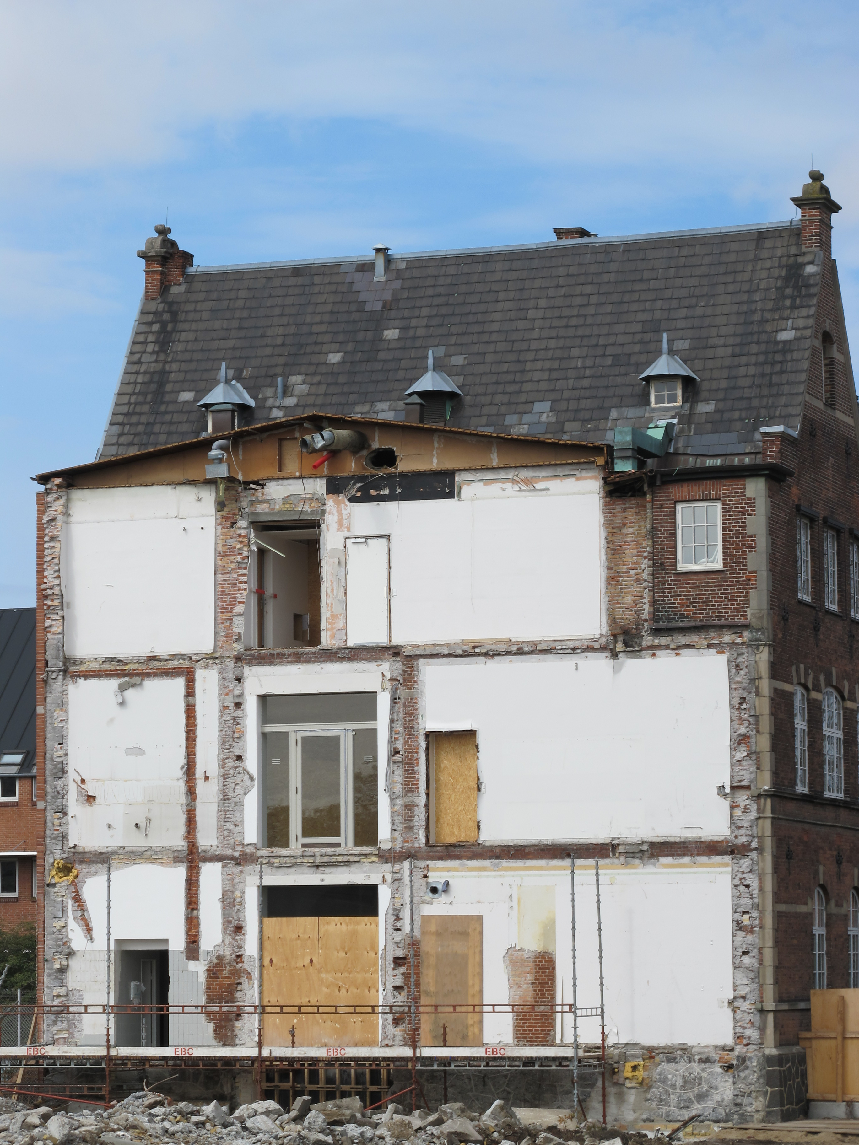 Carlsberg